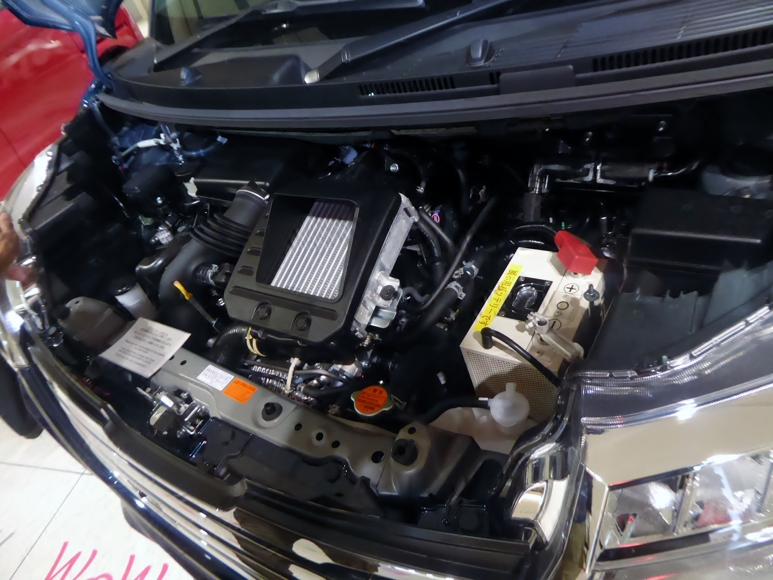 DBA-M900A-AGBVJ型トヨタ・ルーミーカスタムG-T 2WDのエンジンルームを撮影。